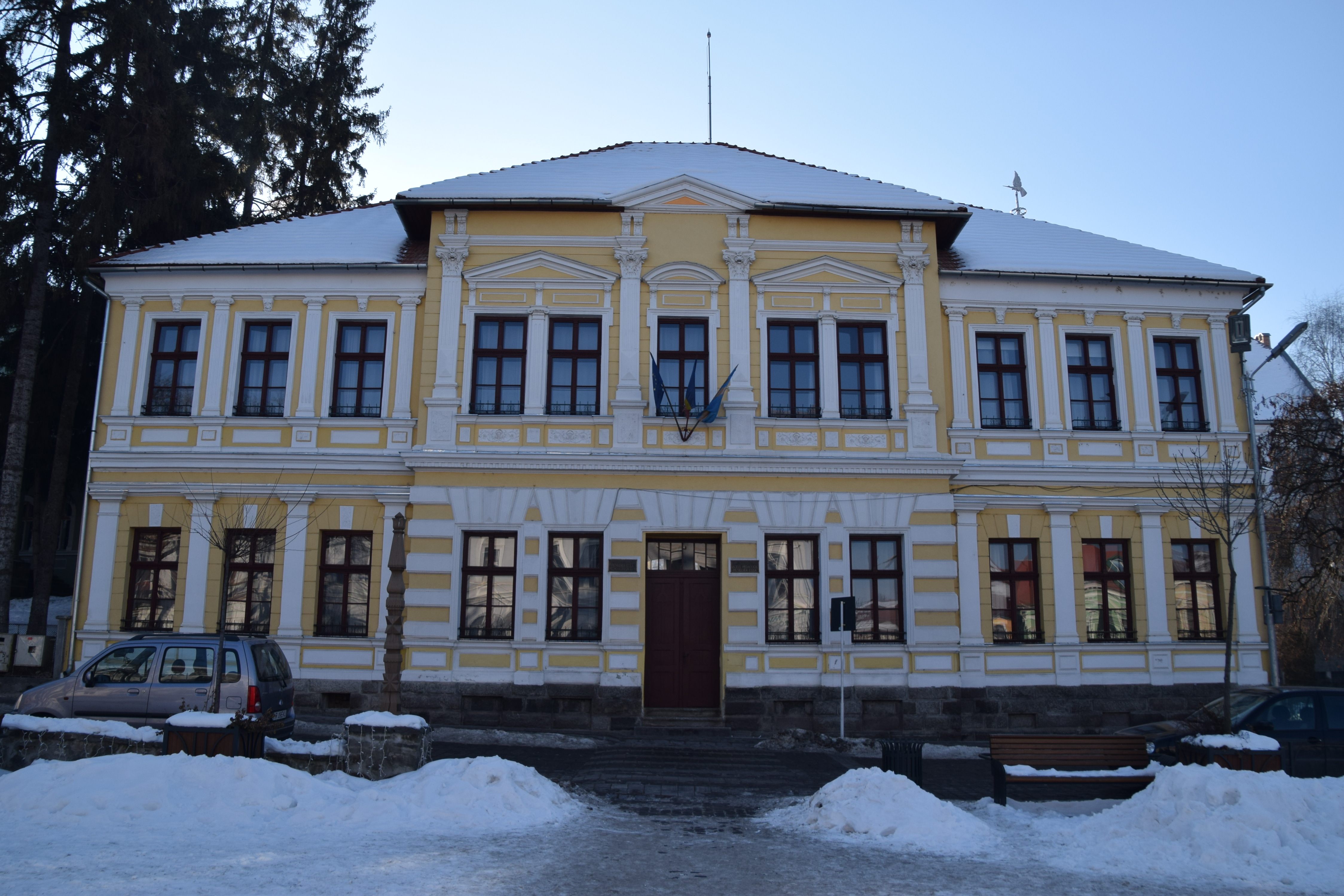 Școala de aplicație a liceului „Benedek Elek”, fosta grădiniță Maria Valeria